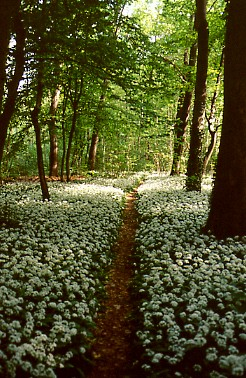 Monza (Parco): sentiero in un bosco.